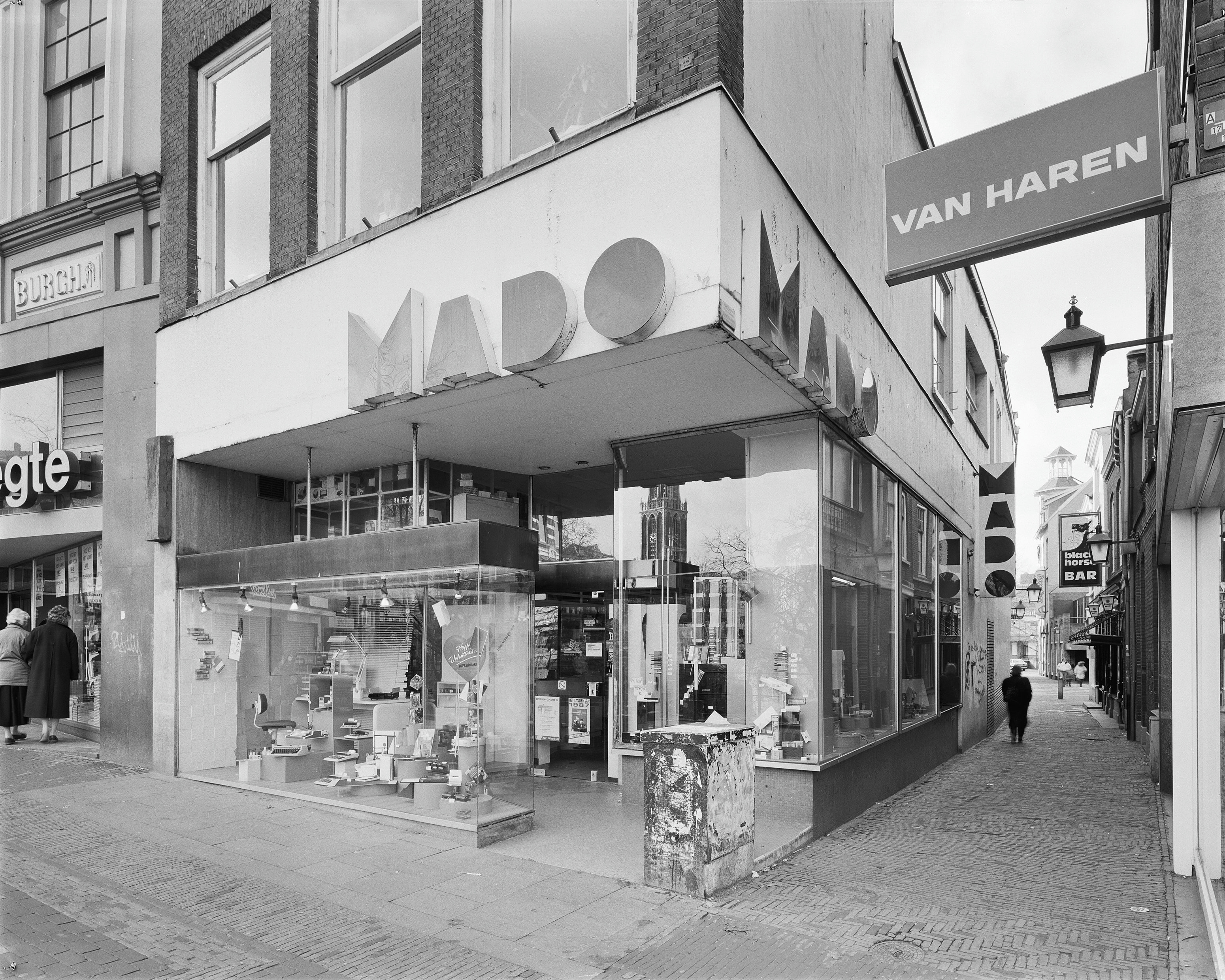 Exterieur VOORGEVEL